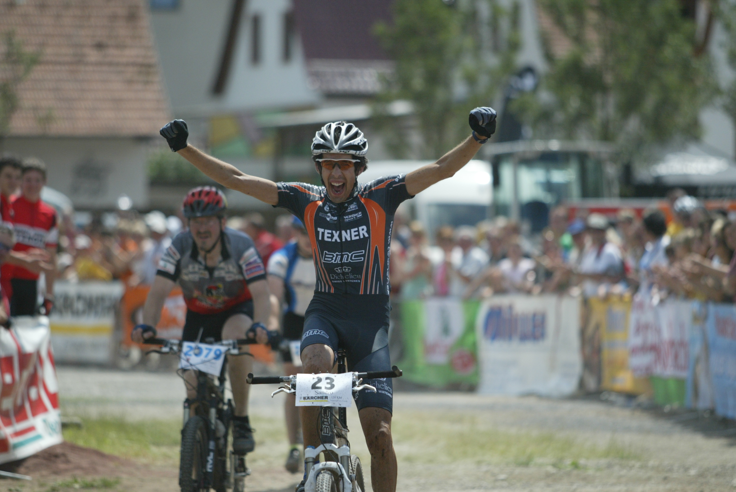 Der Mountainbike-Profi Sandro Spaeth bei seinem Sieg am internationalen Spessart Bike Marathon in Frammersbach 2008